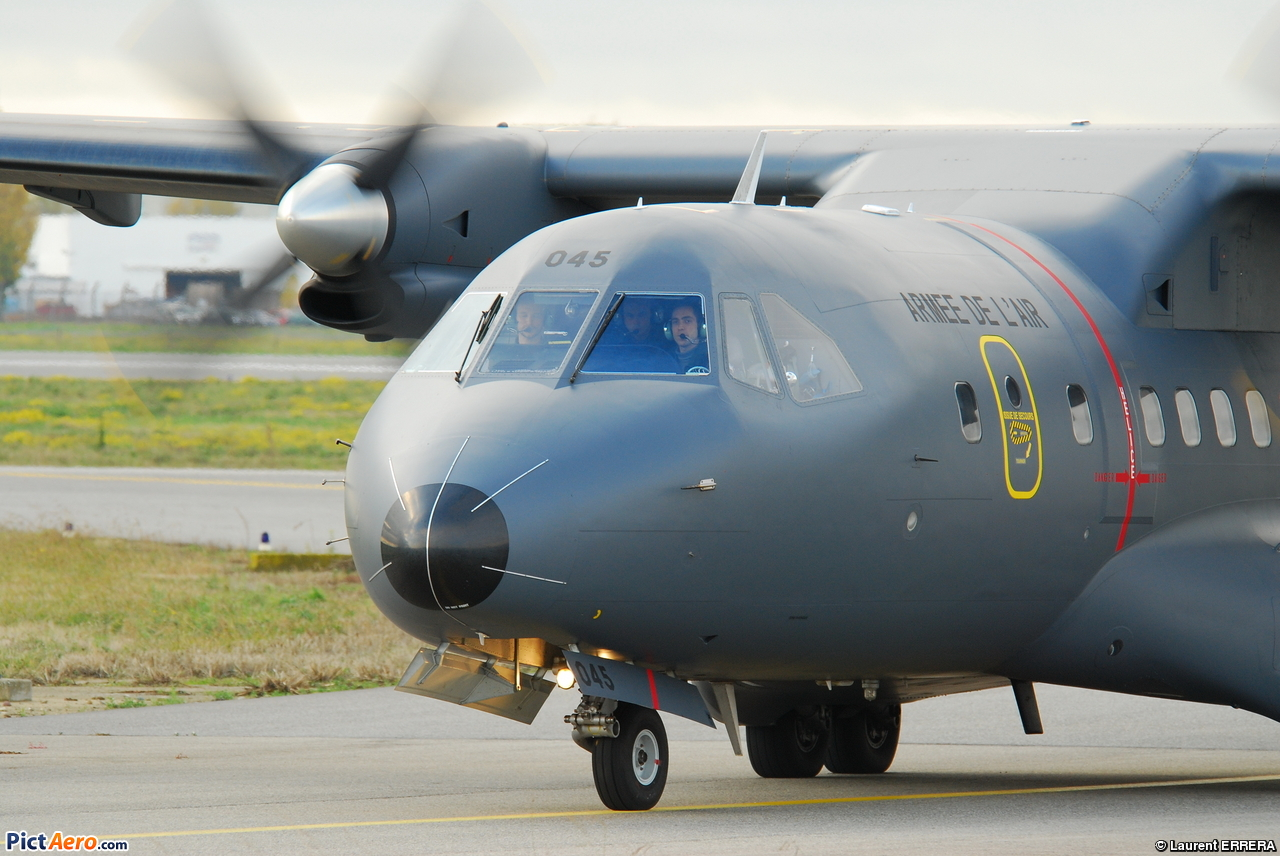 Photo prise à l'aéroport de Toulouse-Blagnac (LFBO) en France. Picture take at Toulouse-Blagnac Airport (LFBO) in France.